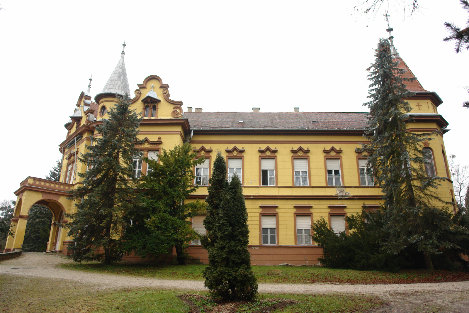 v. Pallavicini-kastély, Tüdőszanatórium (Mosdós, Petőfi S. u. 4 .) This is a photo of a monument in Hungary. Identifier: 8015